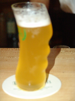 Bönnsch, sorte Kölsch bonnoise Bönnsch, sorte Kölsch bonnoise. Auteur : Régis Lachaume. Buveur : voir « auteur », comme l'atteste la qualité de la mise au point. DomainePublic